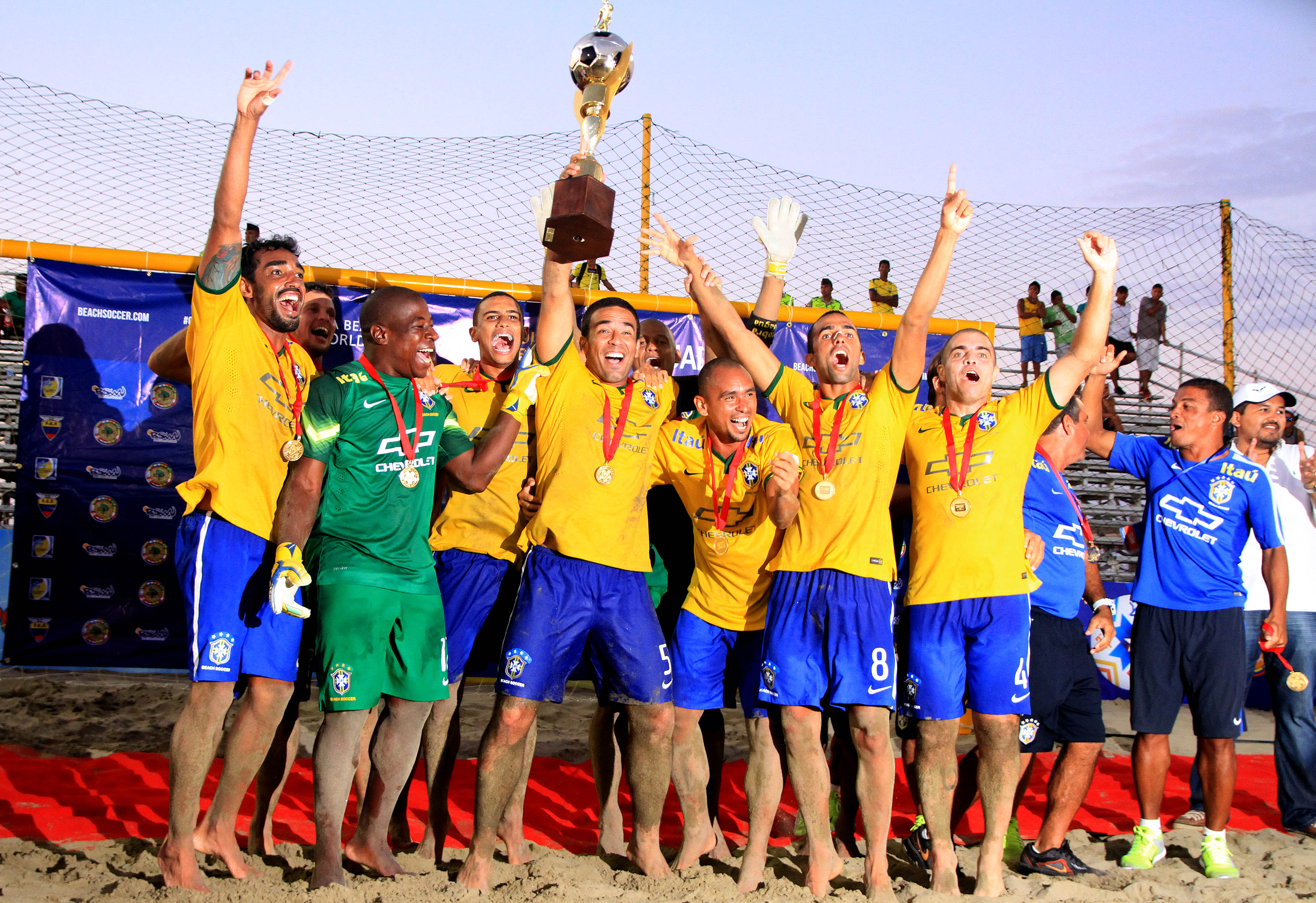 Manta, 26 de abr (Andes).-Brasil se adjudico el primer lugar del Sudamericano de fútbol playa que se realizó en Manta. Foto:César Muñoz/Andes